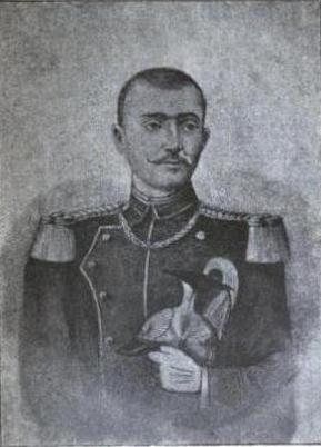 Vasile Cârlova (1809 - 1832)